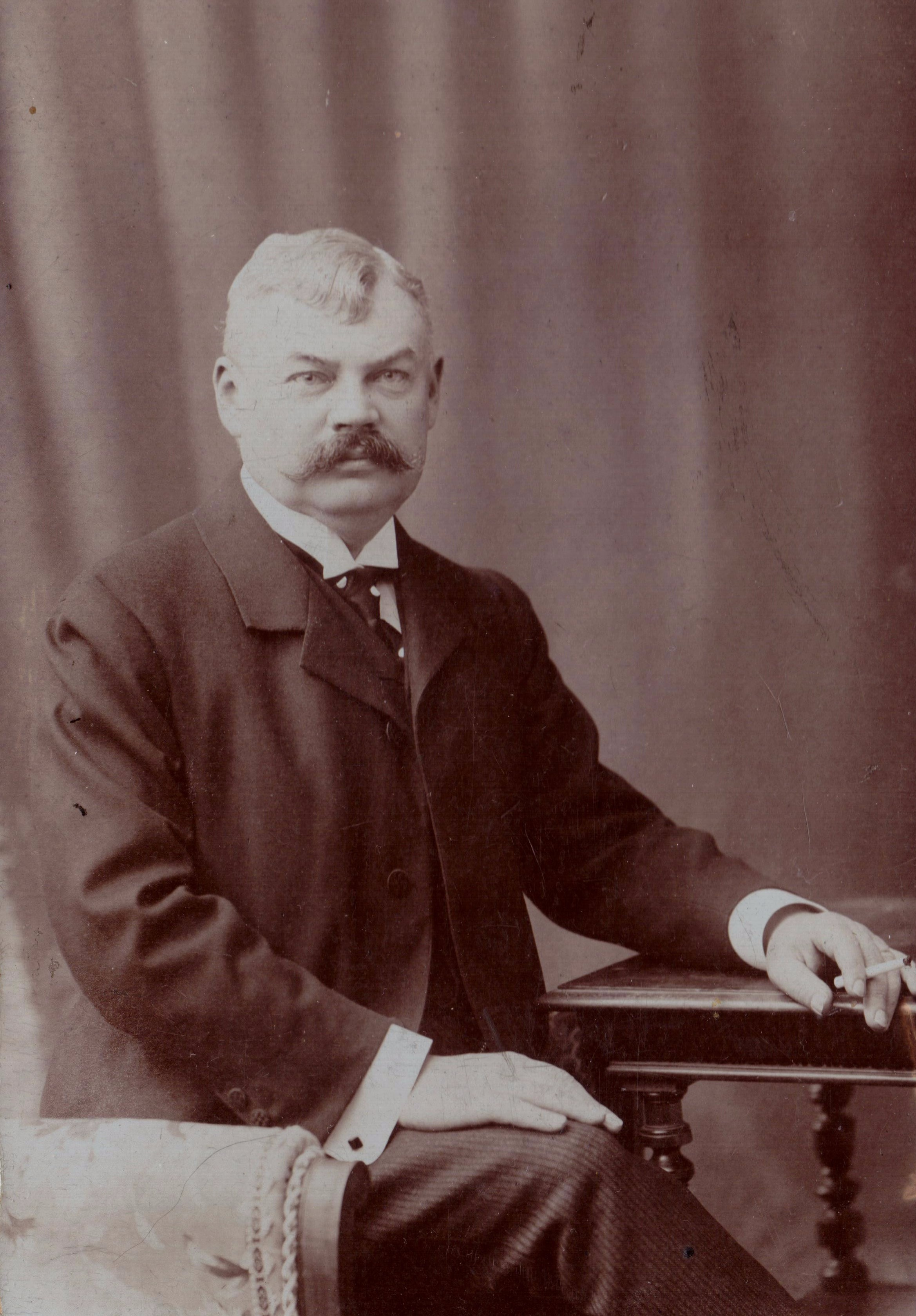 Jedlicska Béla közjegyző (1860-1936) Szegedre történt kinevezésekor, 1903-ban